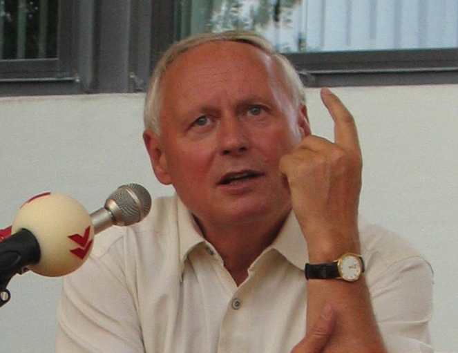 Oskar Lafontaine (MdB, Vorsitzender Linksfraktion ab 2005), Bundestagswahlkampf 2005, Auftritt am 1. Sep. 05 in Kaiserslautern für den gemeinsamen Wahlantritt WASG/Linkspartei.PDS